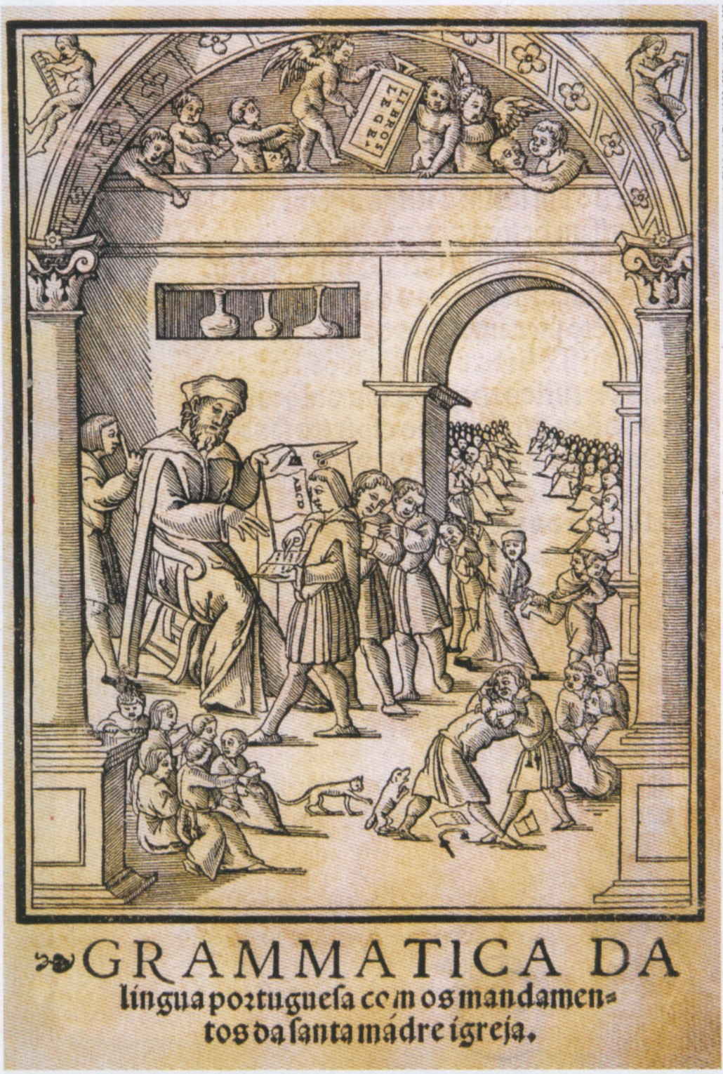 Capa da Grammatica da Língua Portuguesa com os Mandamentos da Santa Madre Igreja de João de Barros.